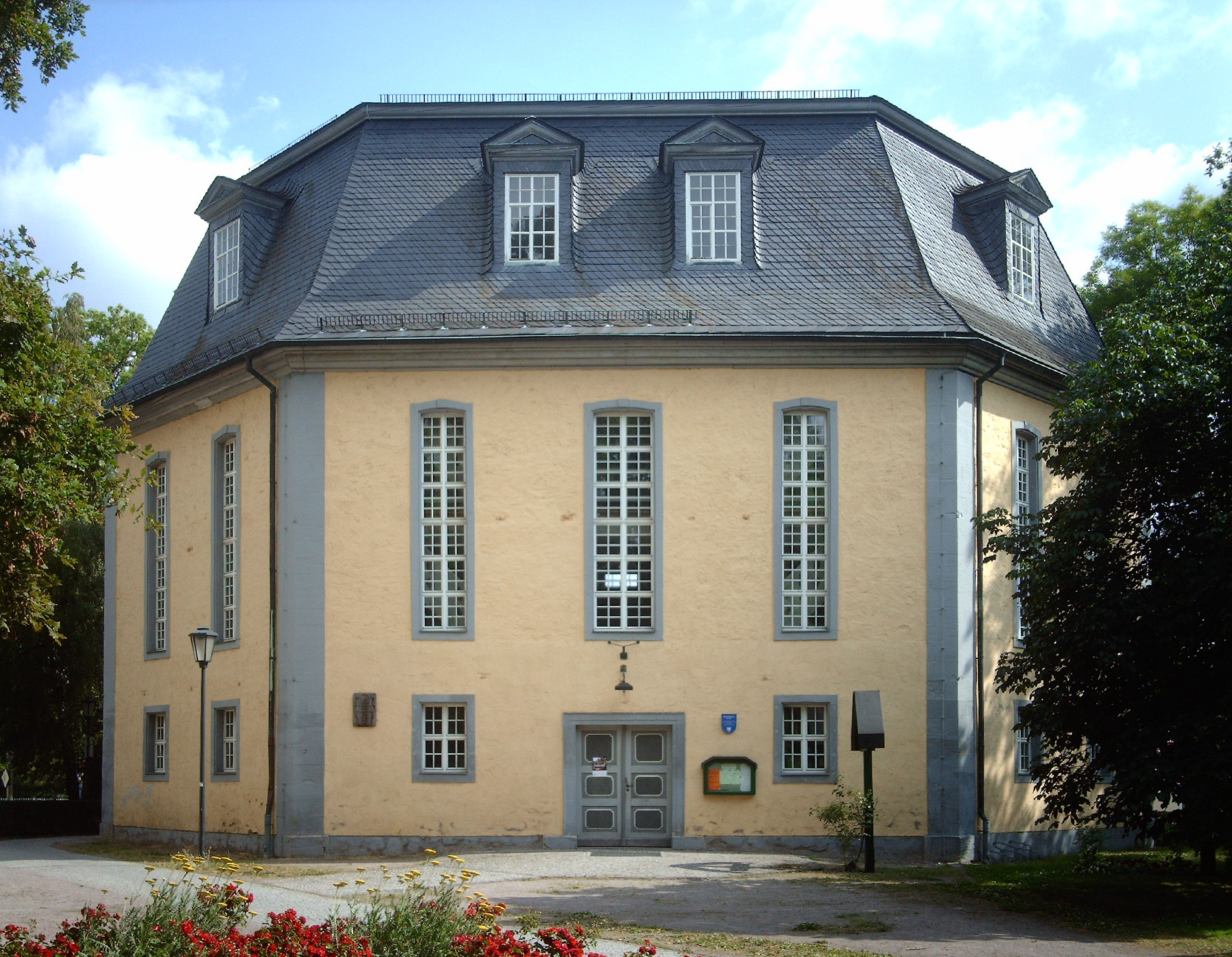 Himmelfahrtskirche (Gottesackerkirche) in ArnstadtEsperanto: Preĝejo de la Ĉieliro en Arnstadt (Germanujo), ĉe la Malnova tombejo